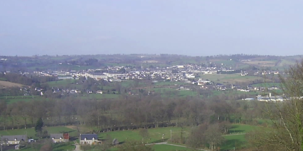 Vue d'ensemble de la commune de Sourdeval, département de La Manche, Normandie, France